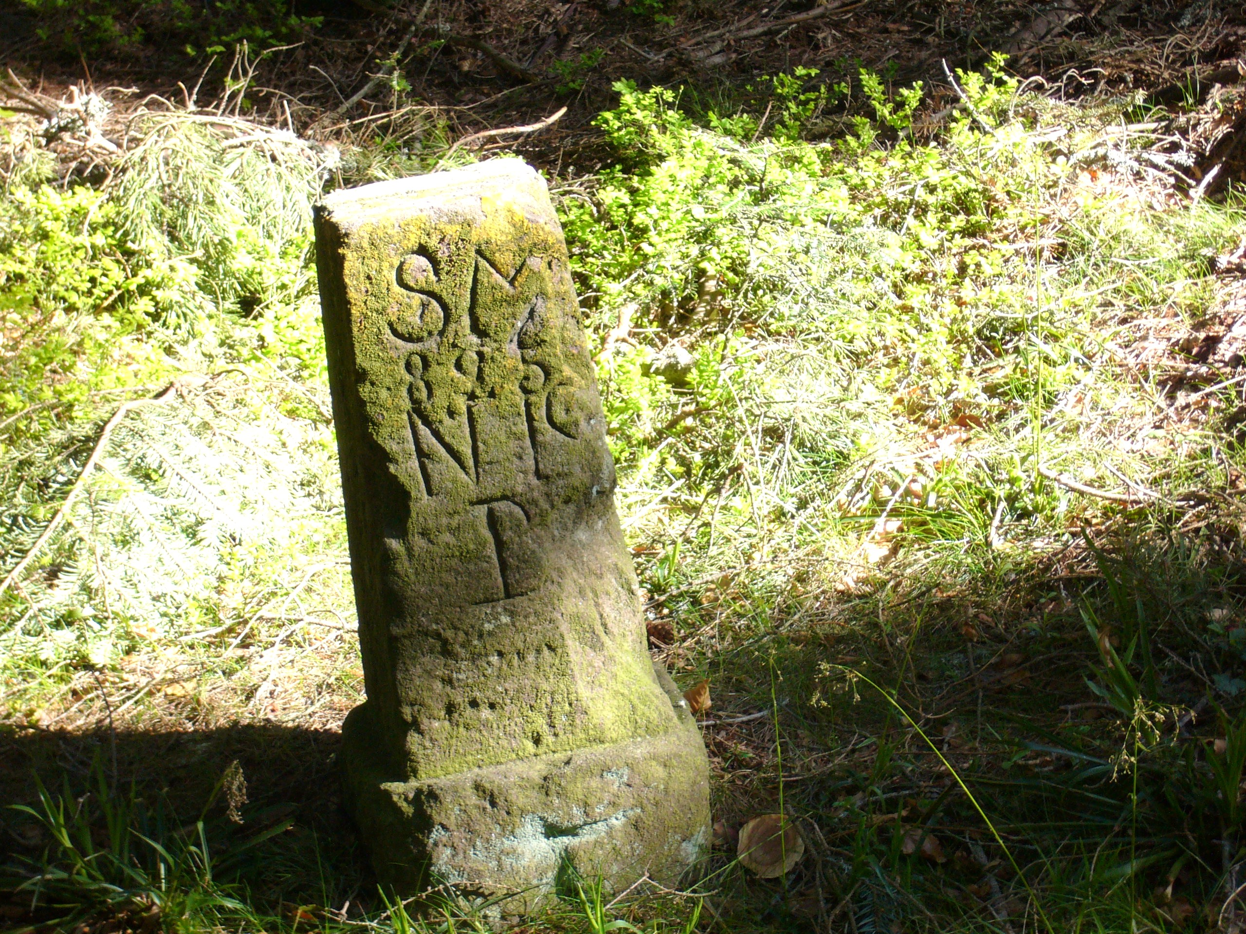 Taennchel 424.JPG